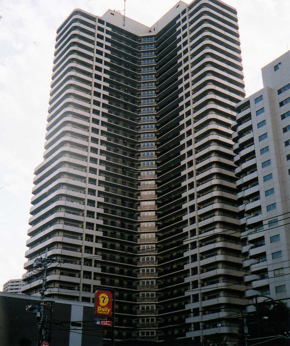 埼玉県中央区の高層マンション「ノースピア上落合」2008年12月中旬に北与野にて利用者が撮影